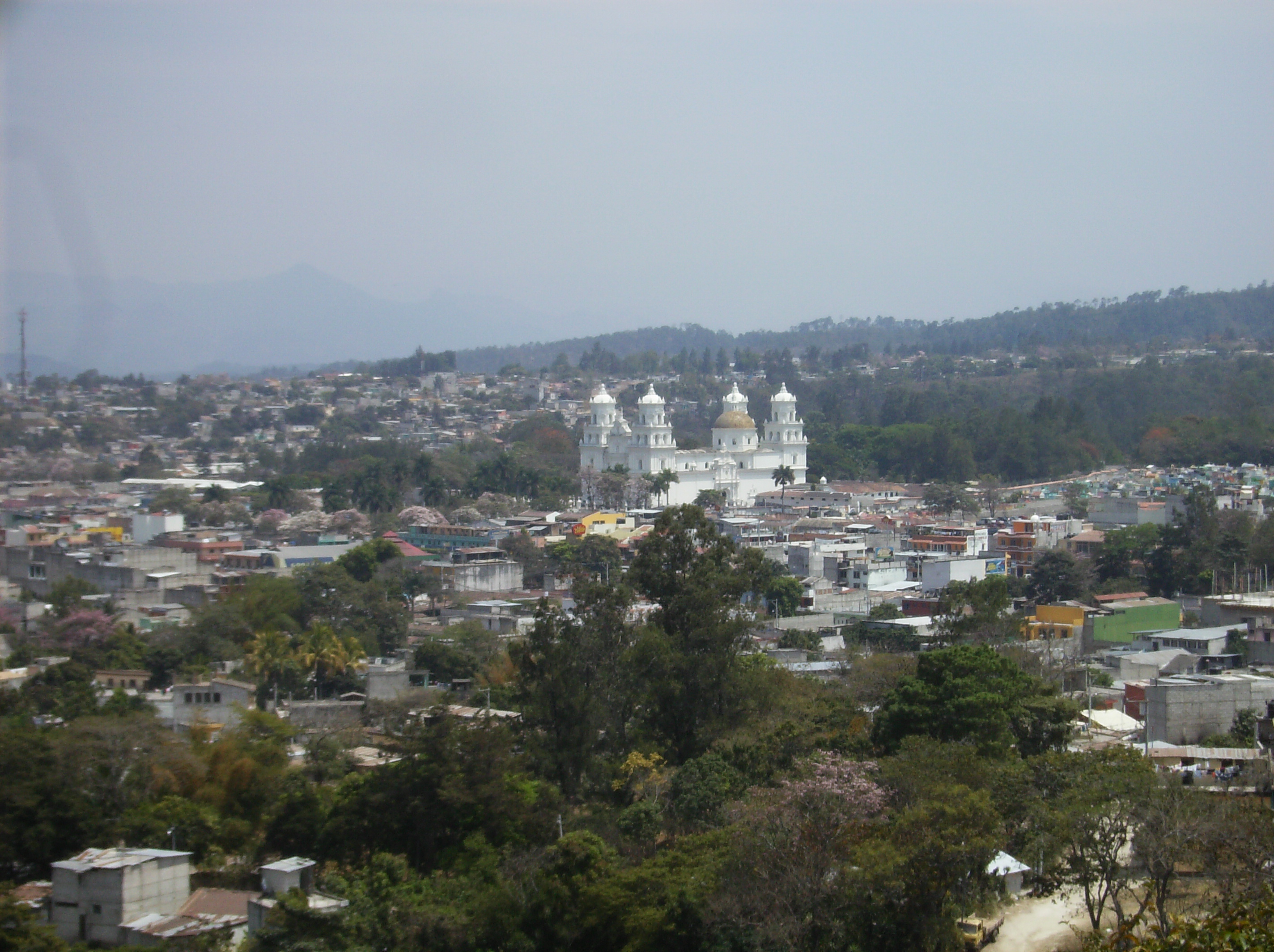 Chiquimula Department, Guatemala